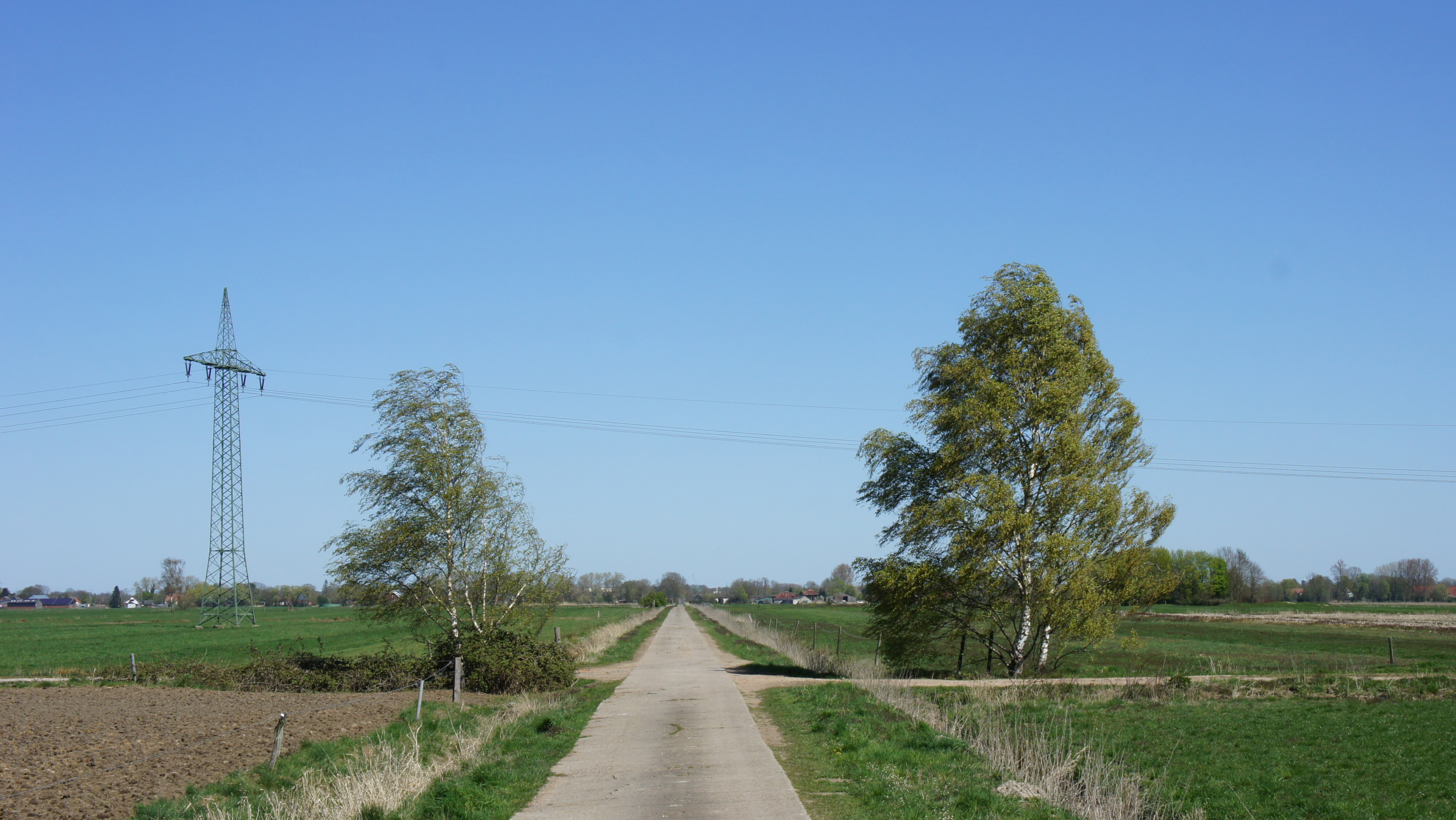 Wirtschaftsweg "Schwadinger Helmer" im Stedinger Moor, Landkreis Wesermarsch